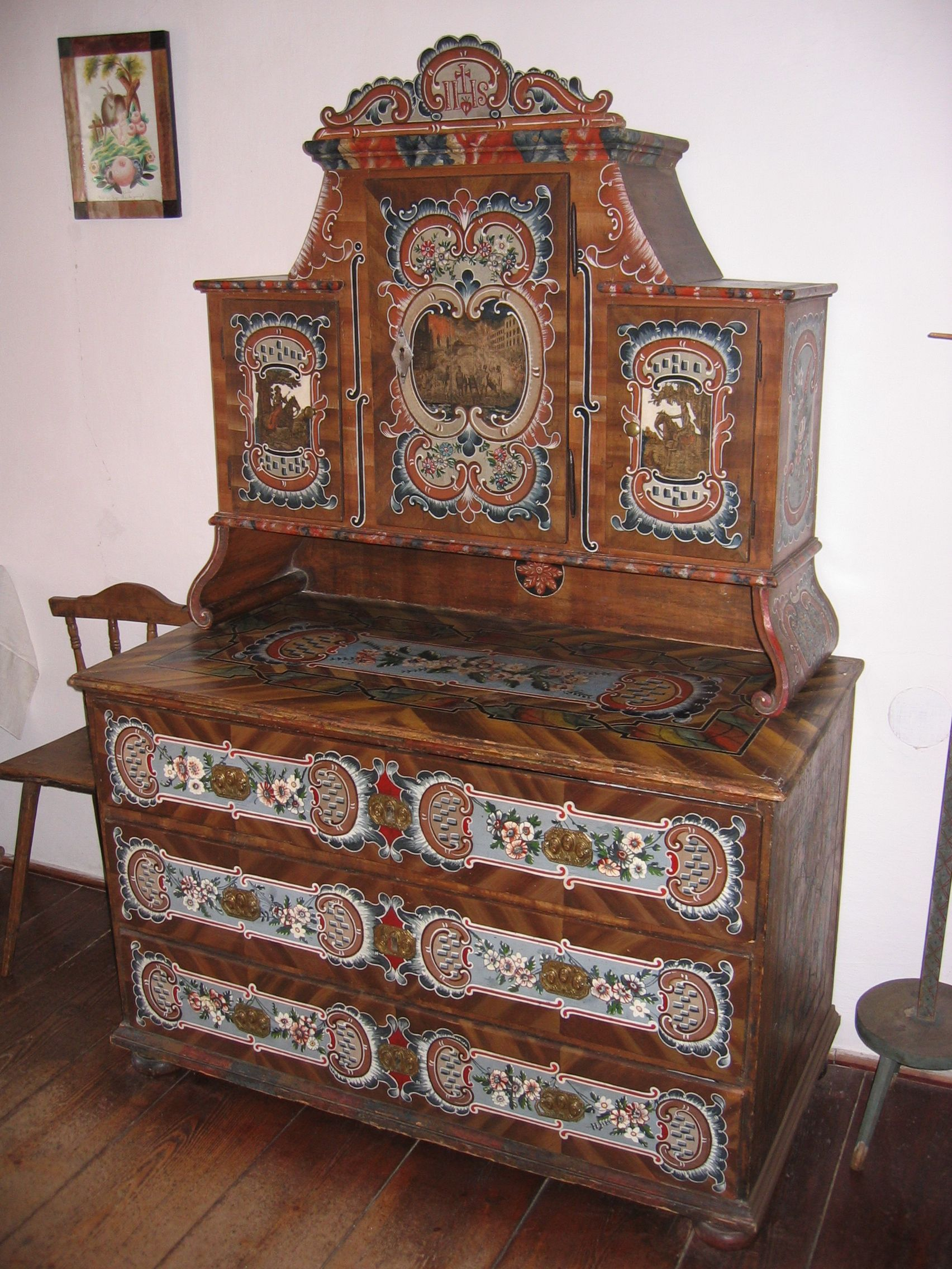 Bauernmöbeln: Kredenz - Museumsbestand